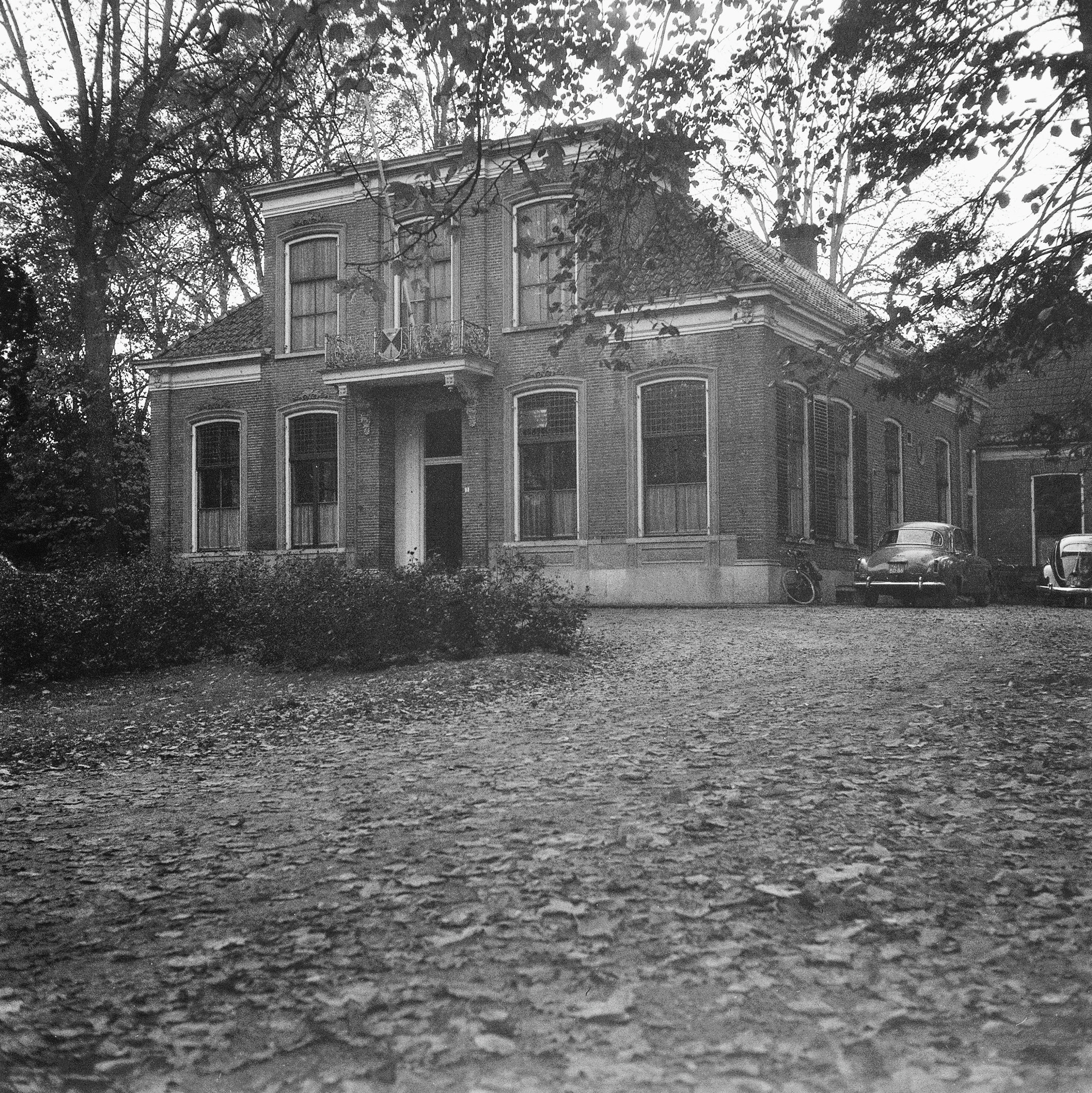 Raadhuis: exterieur